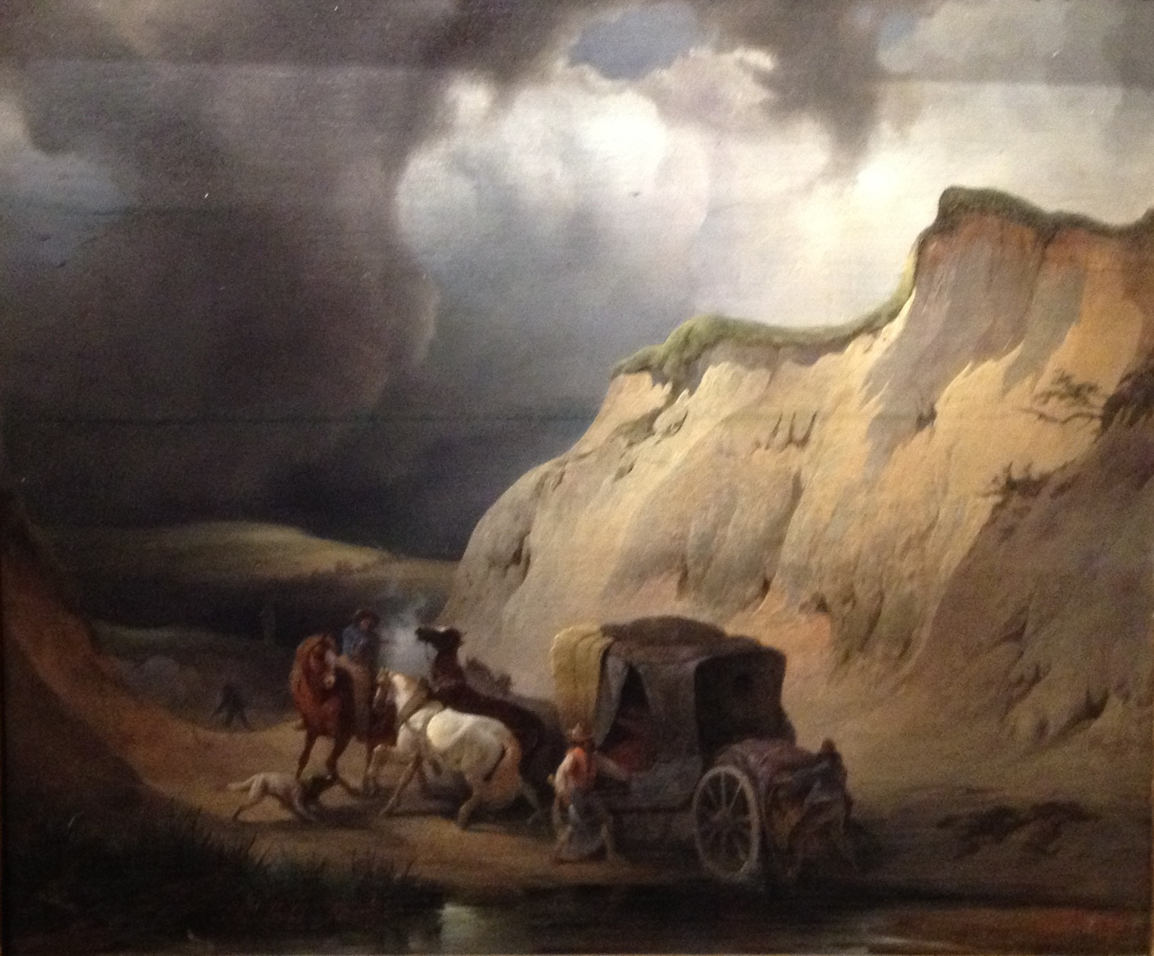 Asalto a la diligencia, de Jenaro Pérez Villaamil. Óleo sobre lienzo.